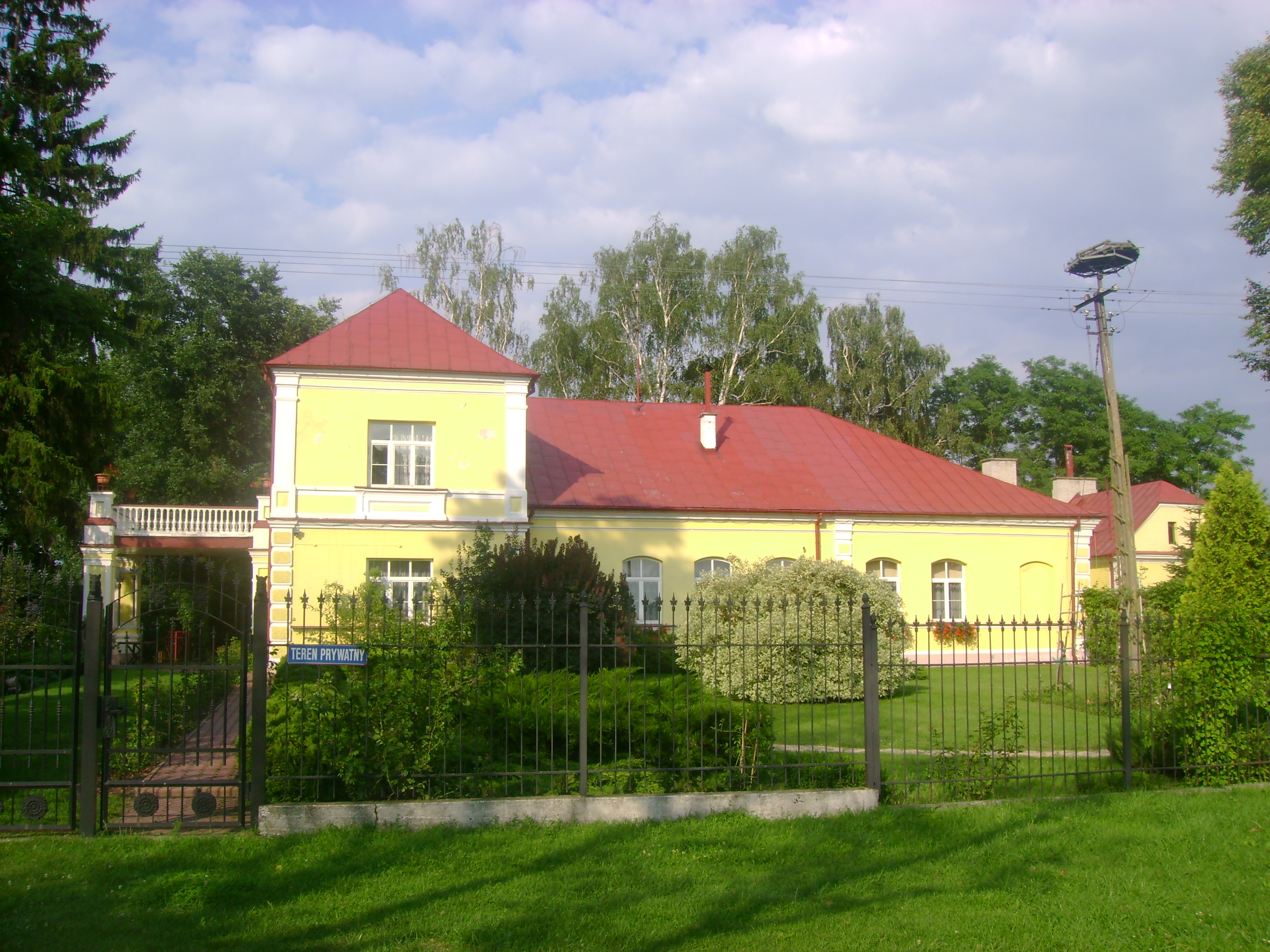 Prywatny dworek w Zabużu